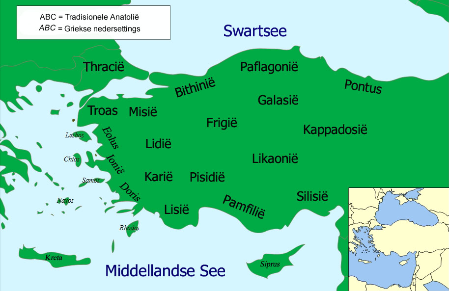 Antieke streke van Anatolië